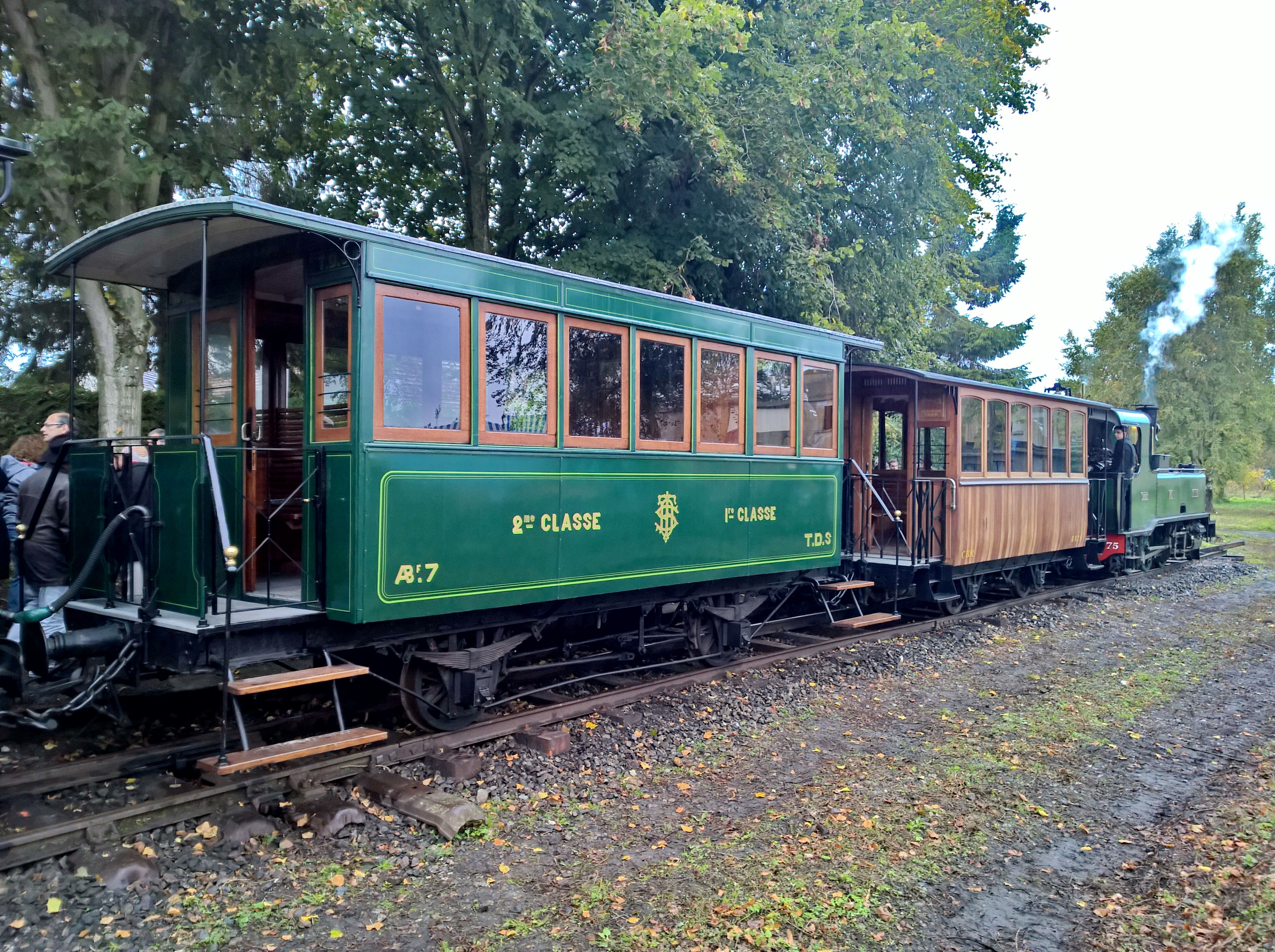 Voiture Horme-et-Buire N° ABf7 (1895) des Tramways des Deux-Sèvres dans le train inaugural du nouveau chemin de fer touristique